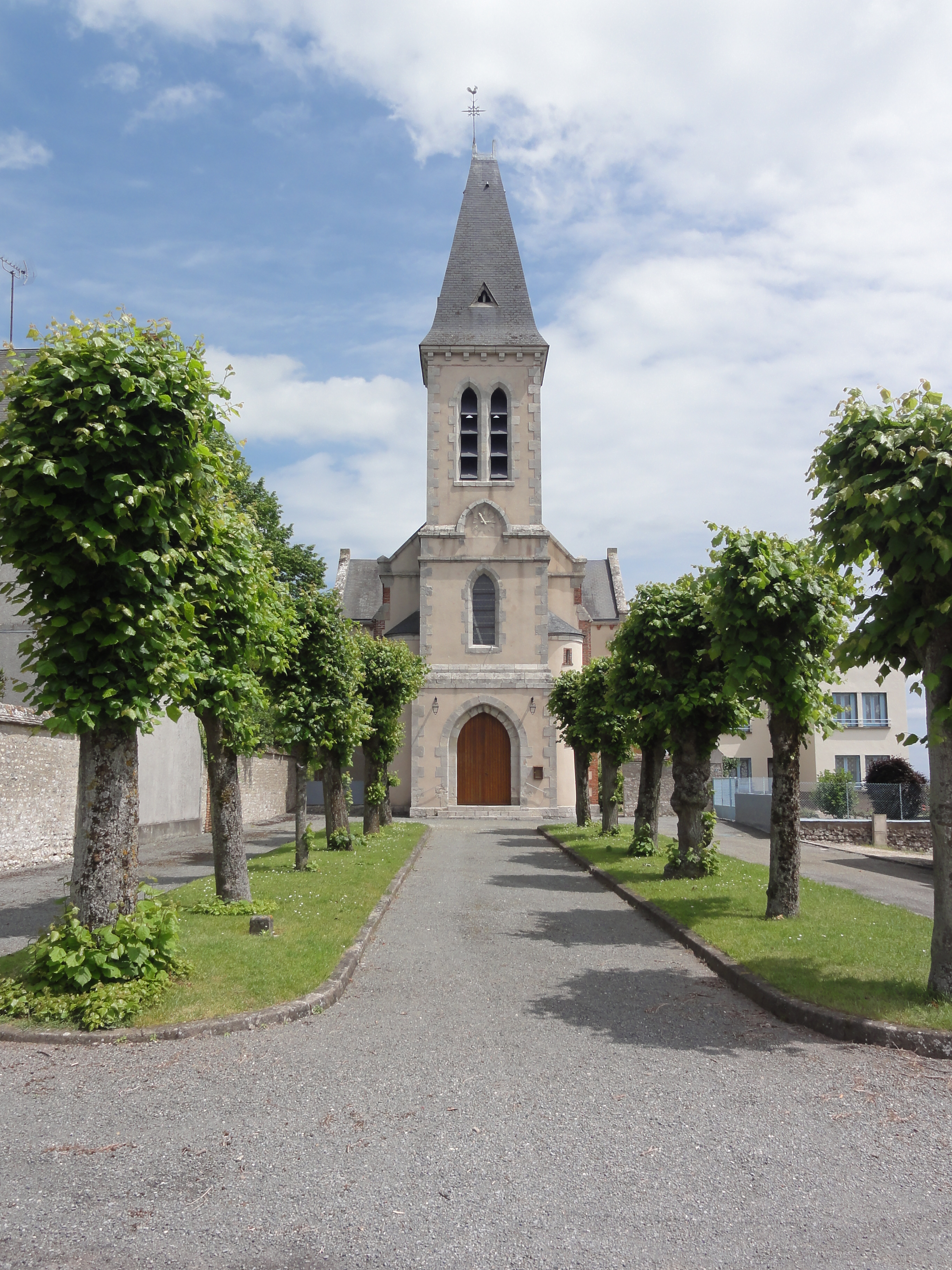 Poinville (Eure-et-Loir) Église Saint-Denis